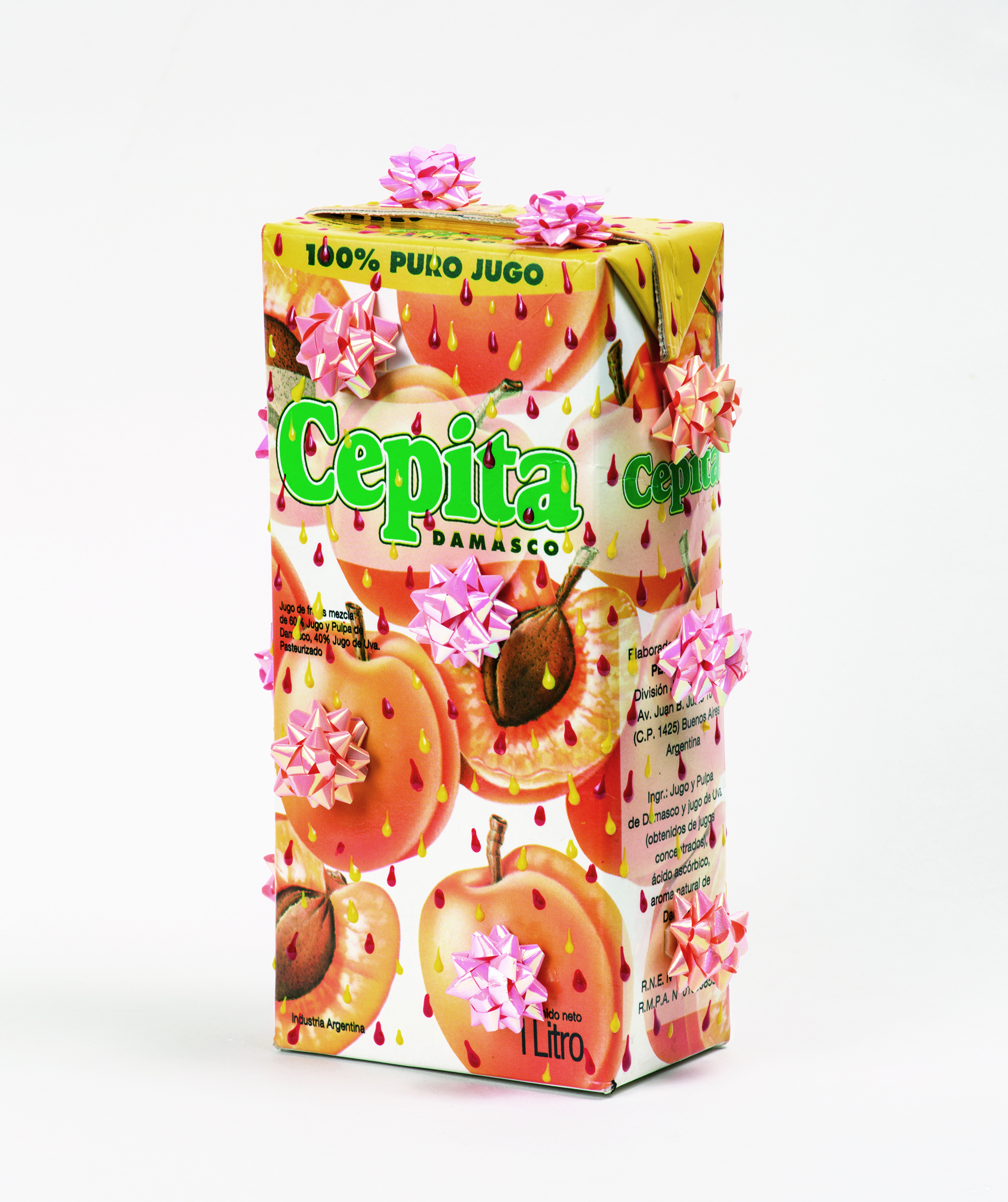 Cepita (1994), Marcelo Pombo